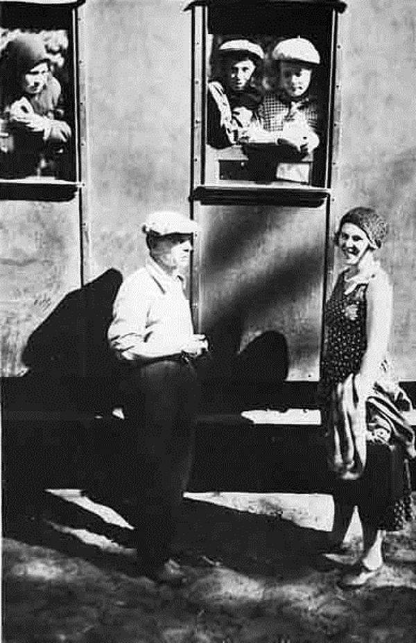 К.Г. Паустовский и В.В. Навашина-Паустовская на узкоколейке в Солотче. В окне вагона: сын писателя Вадим и приемный сын Сергей Навашин. Конец 1930-х годов